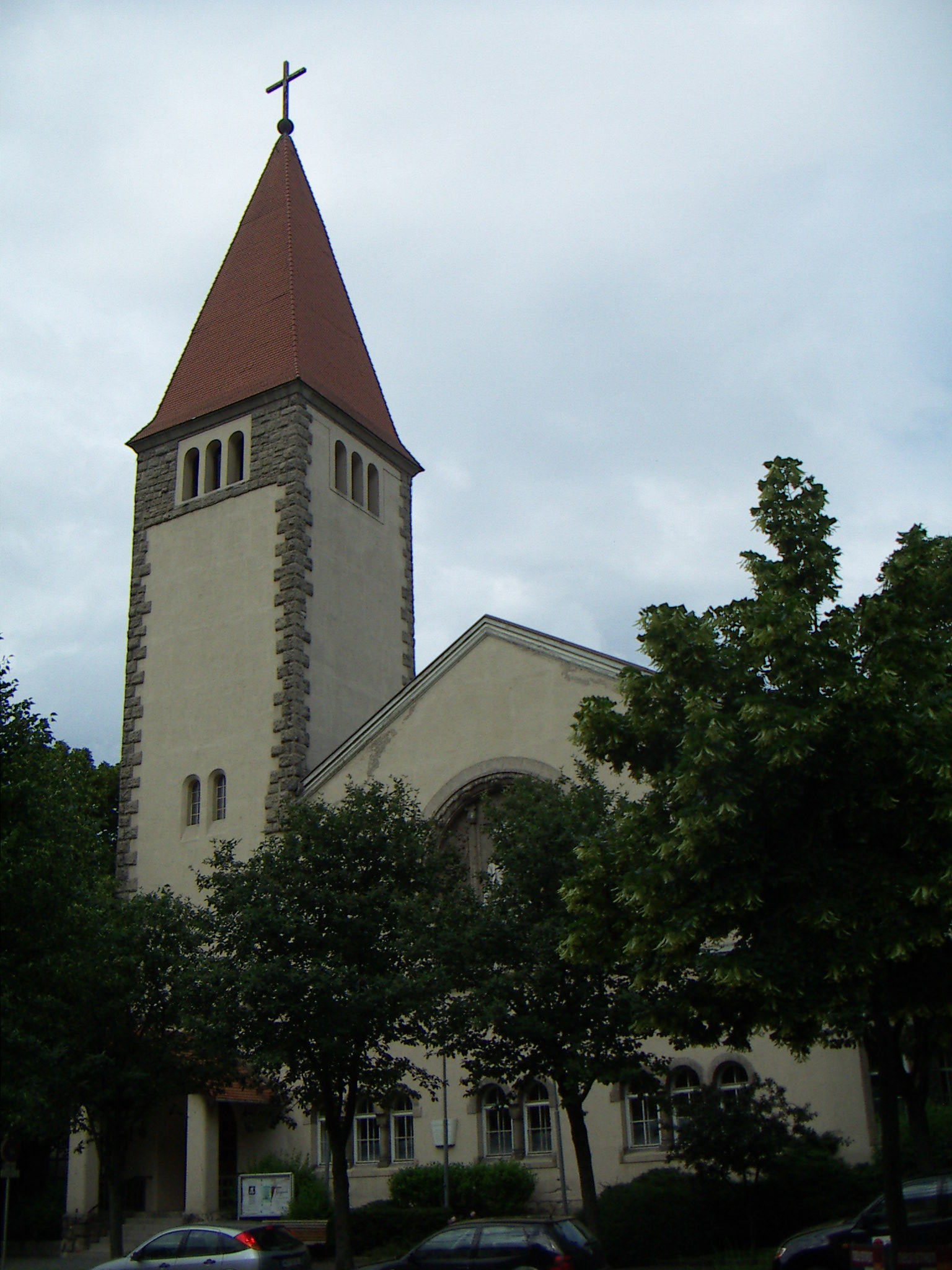 Auferstehungskirche, Evangelische Kirche in Wiener Neustadt, Architekten Siegfried Theiss und Hans Jaksch